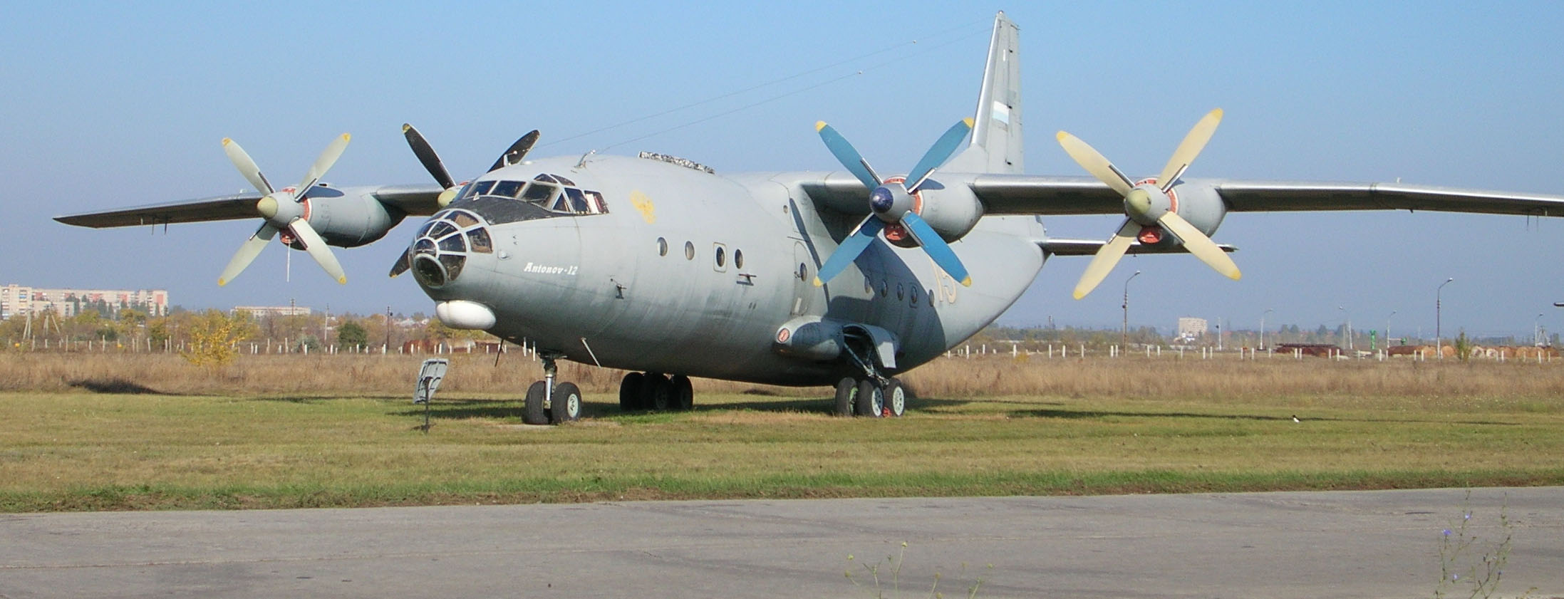 Самолёт Ан-12 в музее дальней авиации на авиабазе Энгельс, Саратовская область.